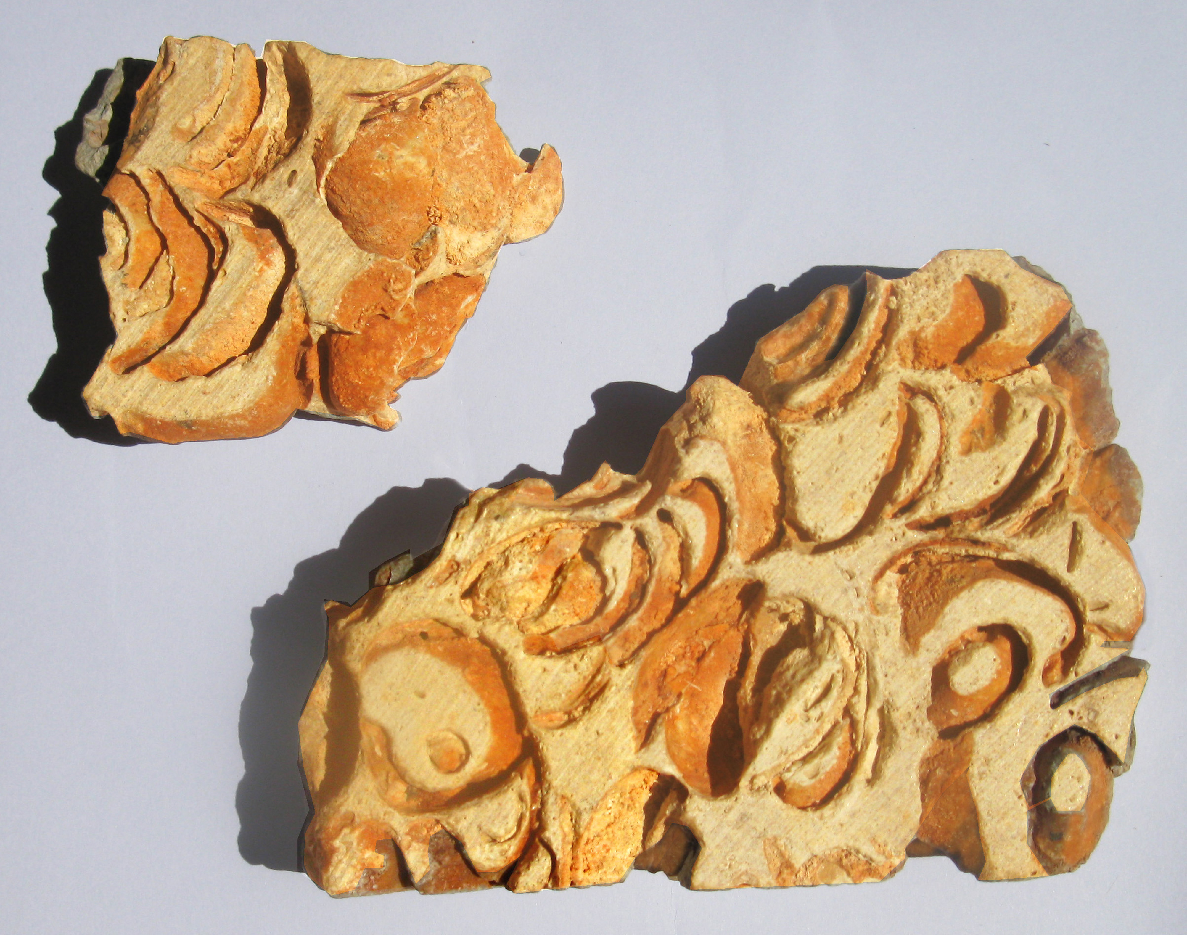 Fausse lumachelle (accumulation de bivalves post-mortem), Miocène, Var, France